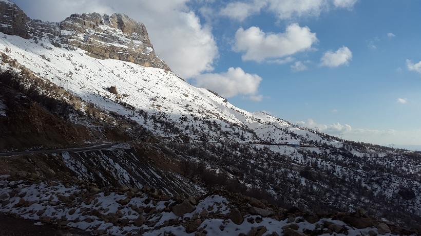 منطقه تاراز